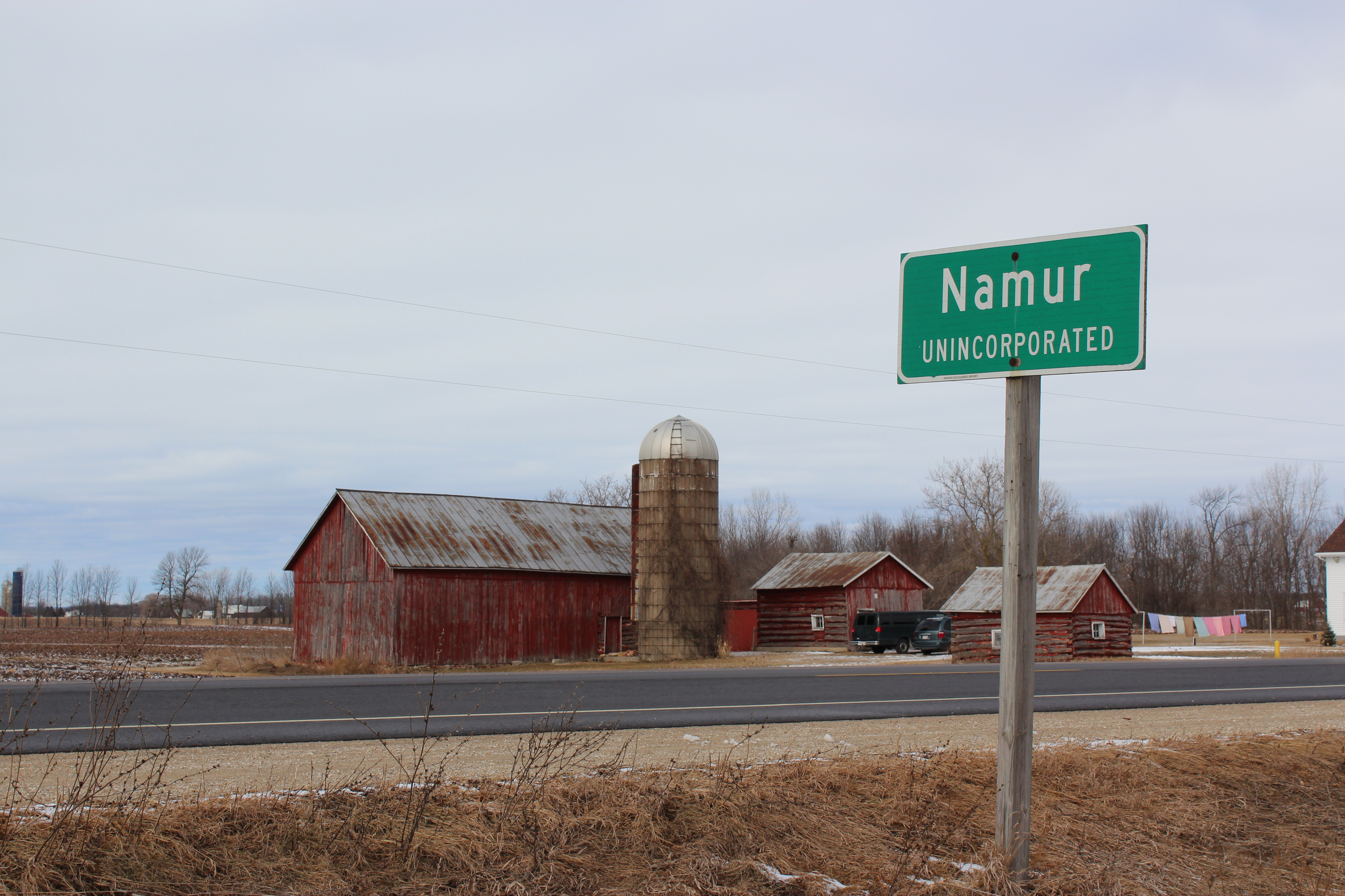 Namur au Wisconsin (USA)